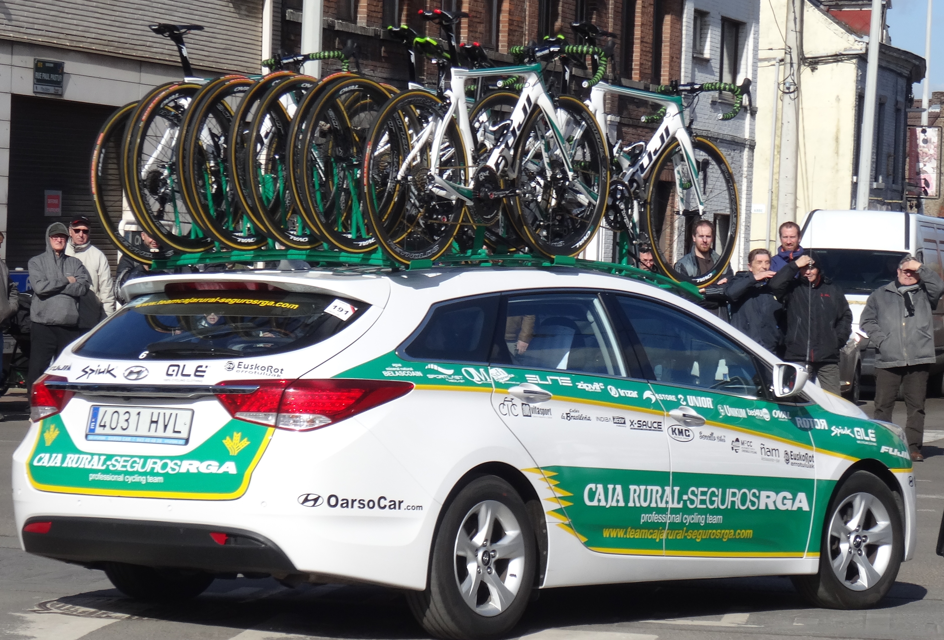 Reportage réalisé le mercredi 4 mars à l'occasion du départ du Samyn des Dames 2015 et du Samyn 2015 à Quaregnon, Belgique.